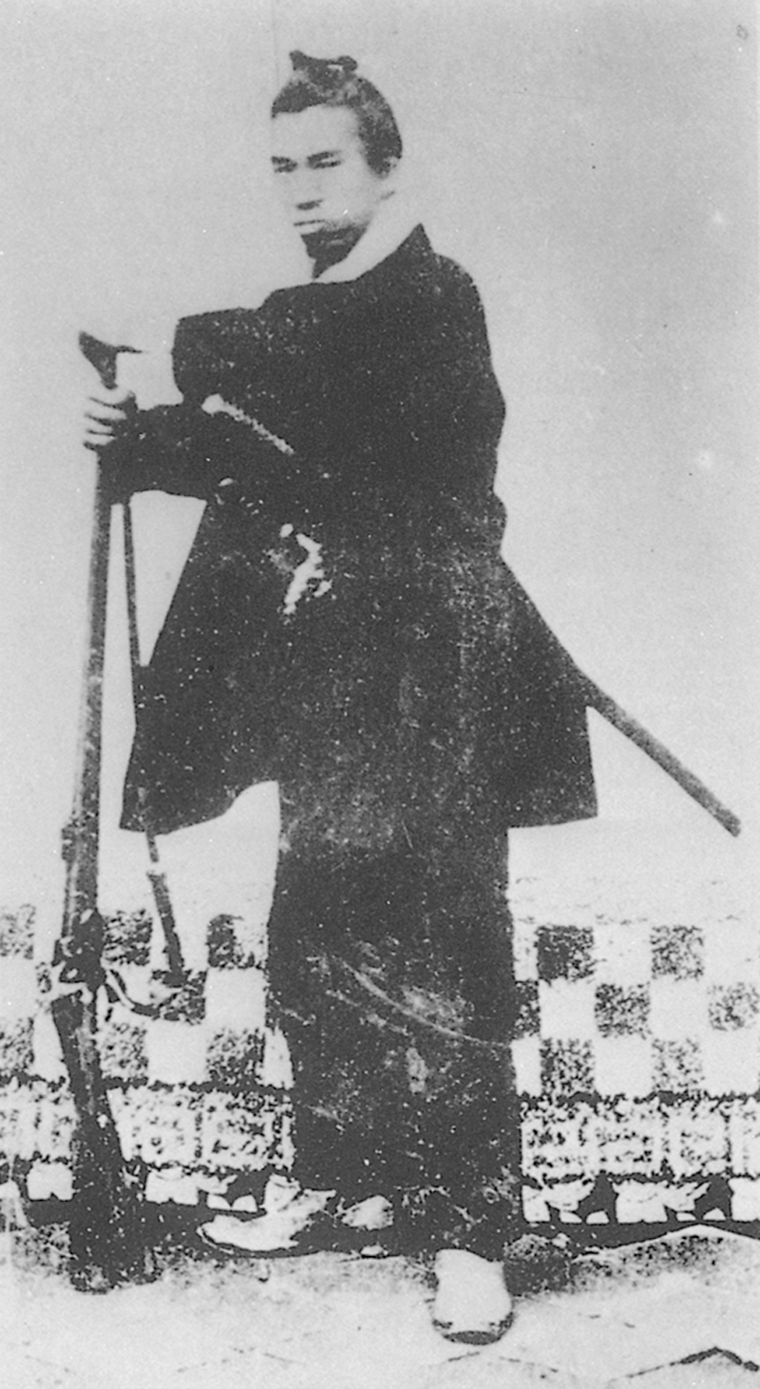 Portrait of Tani Tateki (谷干城, 1837 – 1911)